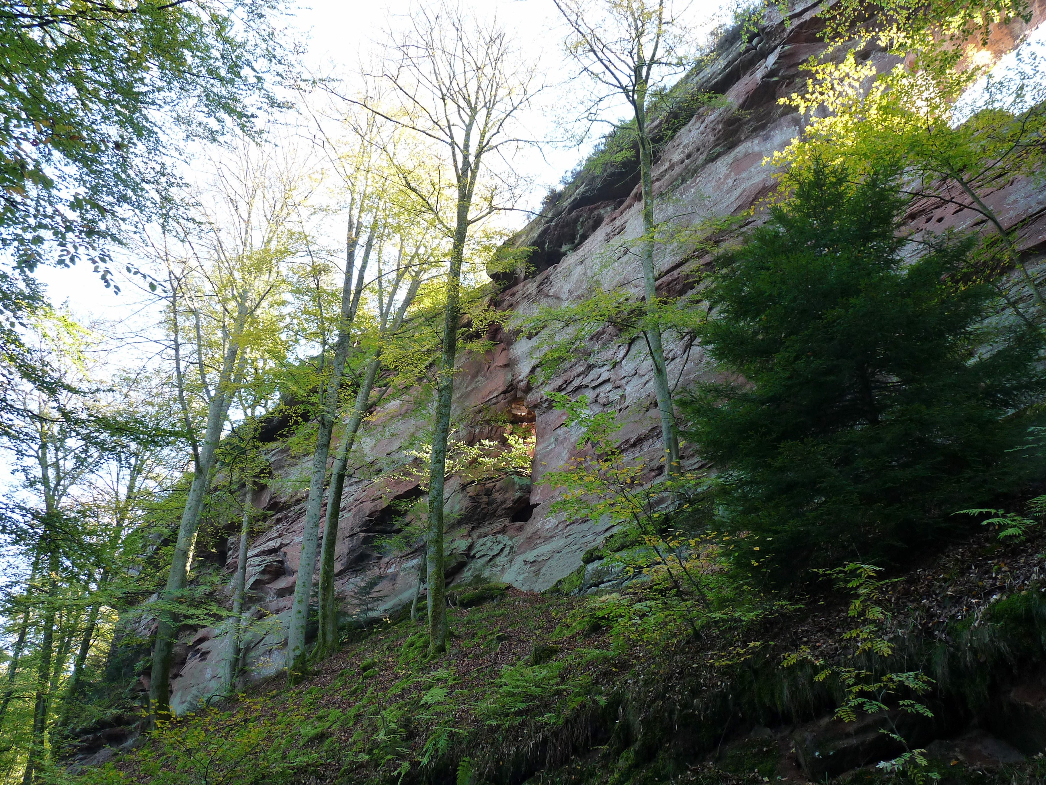 Erbsenfelsen (Moselle)